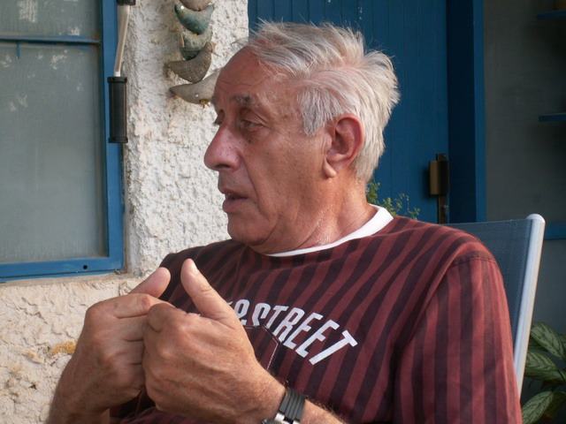 רלף קליין, ראיון ב-2006 לאתר "צהבת" צולם על-ידי אבי קדמי to be photographed by Avi Kedmi